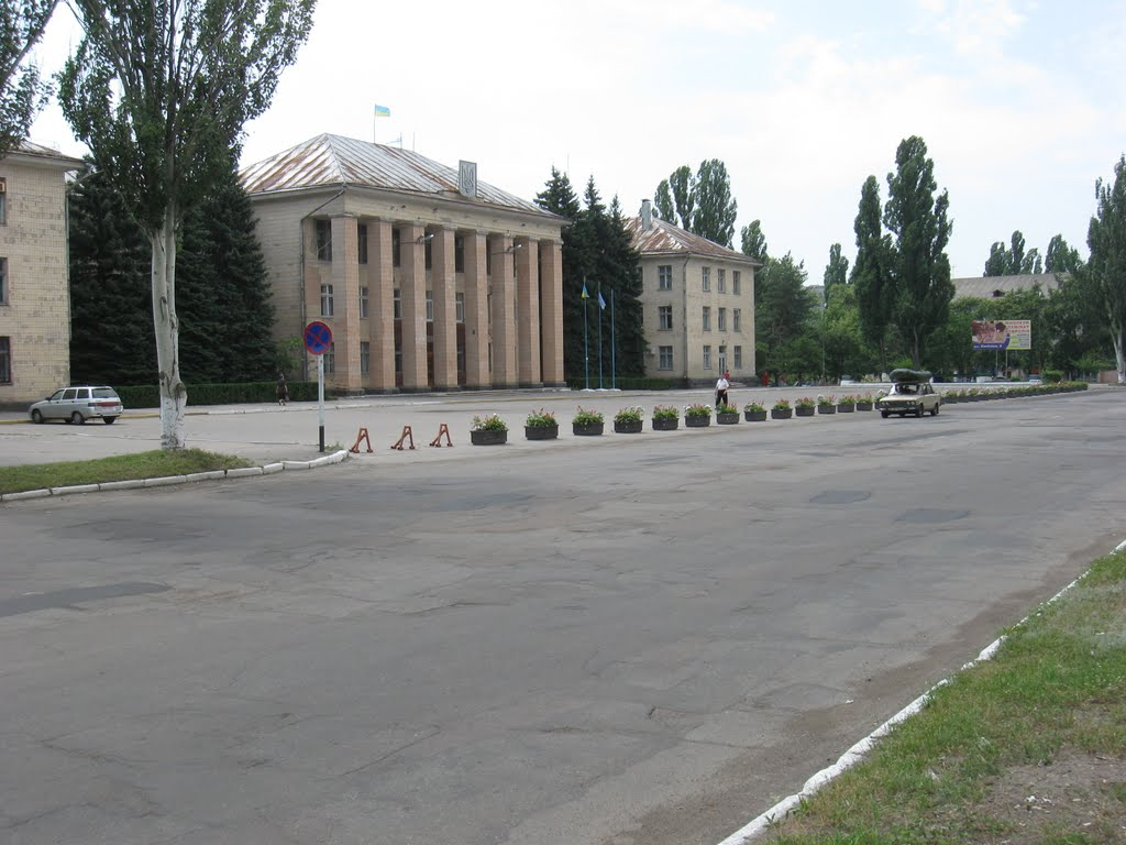 Світловодськ, центральна площа